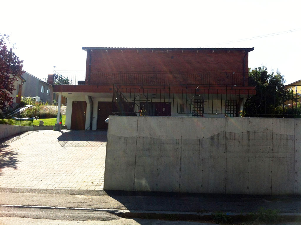 60-talsvilla med tydligt brutalistiska influenser